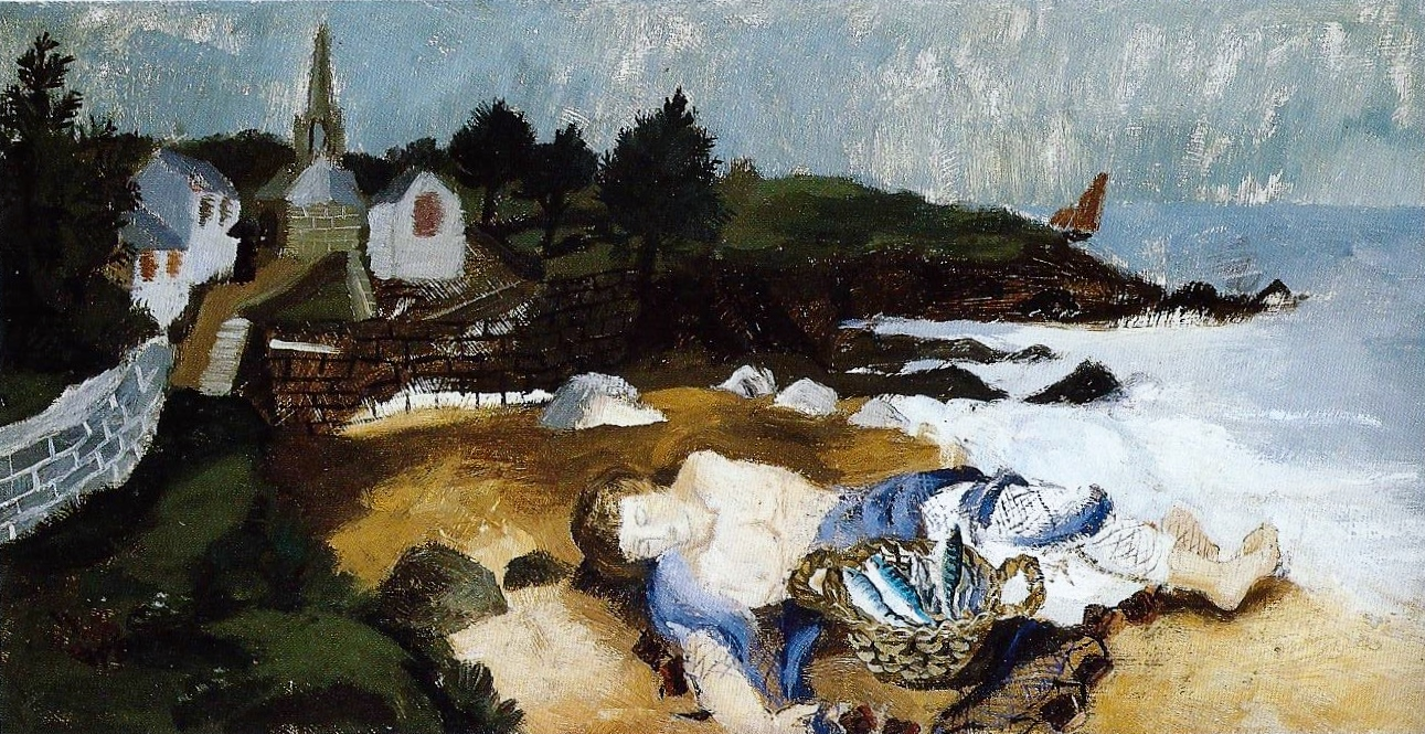 Christopher Wood : Pêcheur endormi, Ploaré (1930, Laing Art Gallery, Newcastel-upon-Tyne) [Le motif est en fait le paysage marin devant la chapelle Saint-Jean de Tréboul (désormais en Douarnenez)]